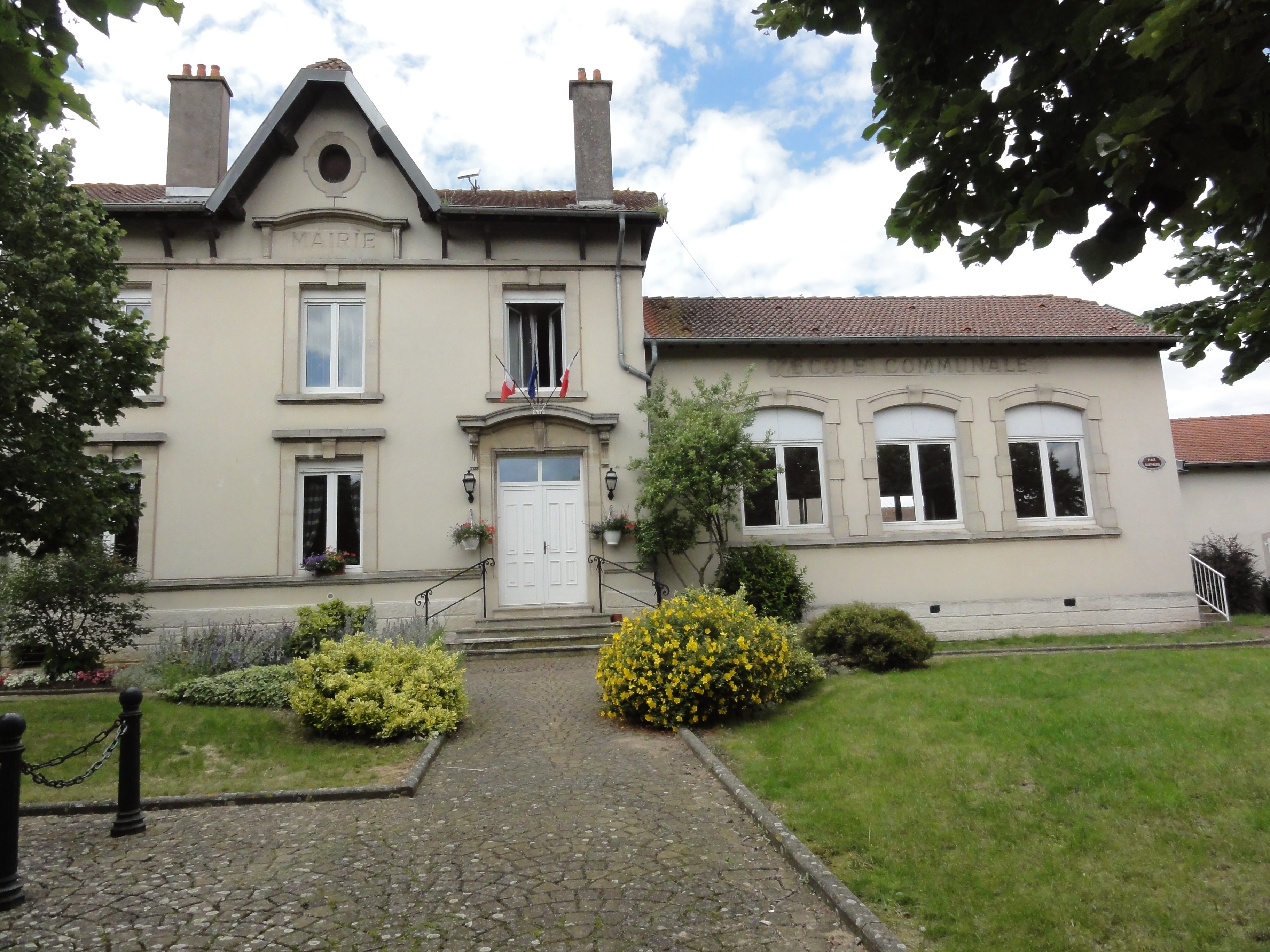 Drouville (M et M) mairie-école